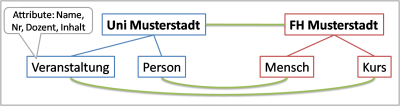 Beispiel für zwei Ontologien und ein mögliches Mapping